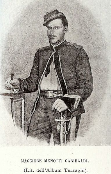 Menotti Garibaldi sur une lithographie